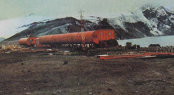 Vista desde el sudeste de la base científica argentina "Corbeta Uruguay" situada en la isla Morrell, con el monte Larsen (710 m) al fondo y el golfo Caldera a la derecha. Fuente: Dirección Nacional del Antártico.